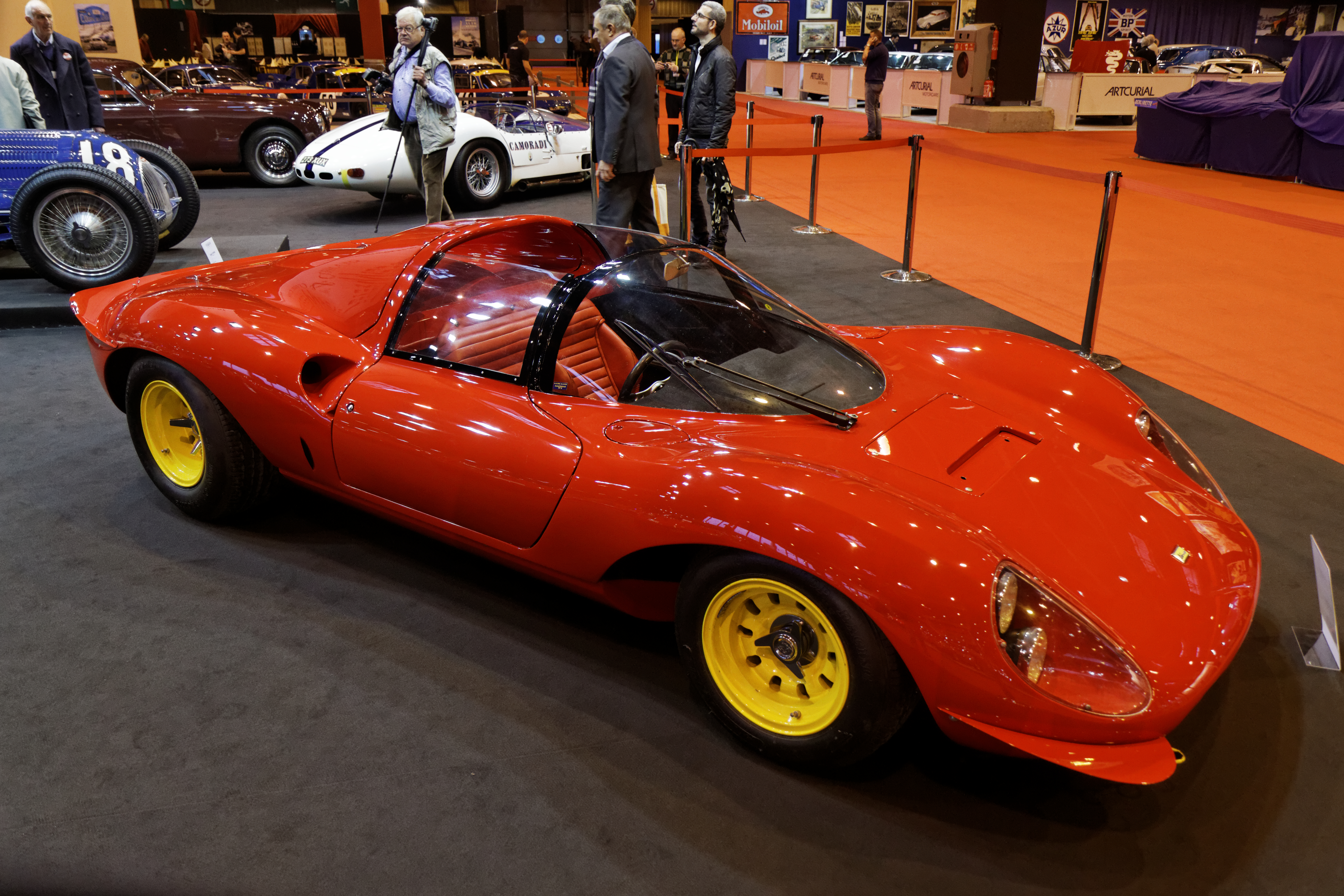 Une Dino 206 SP présentée lors du salon Retromobile 2014.